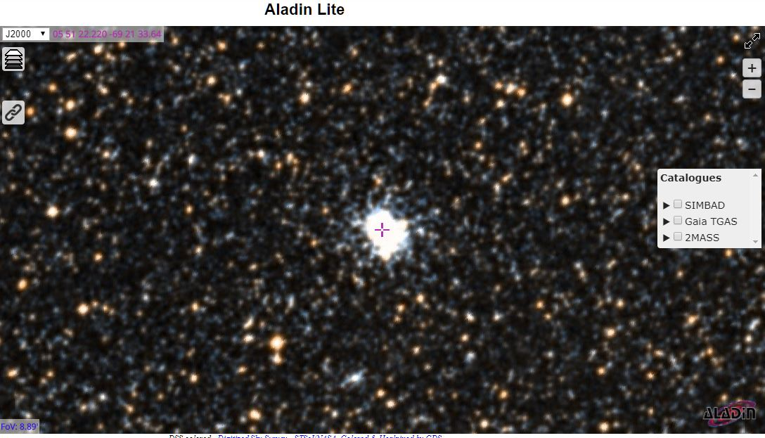 Ces images sont des captures d'écran de la région et de l'objet astronomique affichés par le programme Aladin/Lite que l'on peut utiliser à l'adresse suivante : Le lien dans le texte de la légende permet d'accéder à Aladin Lite et à l'image interactive de l'objet.